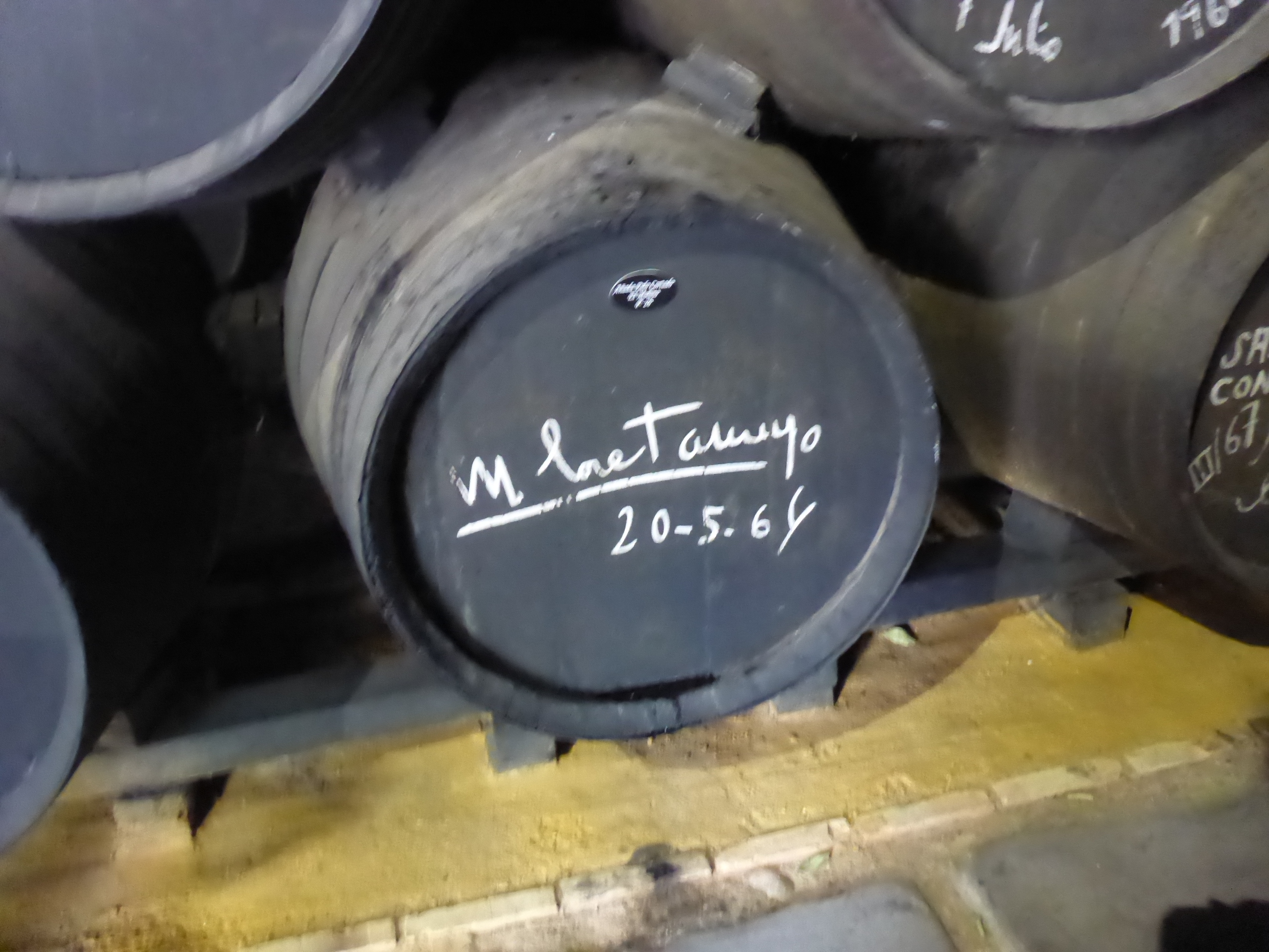 Bodegas Domecq-Fundador en Jerez de la Frontera (España)